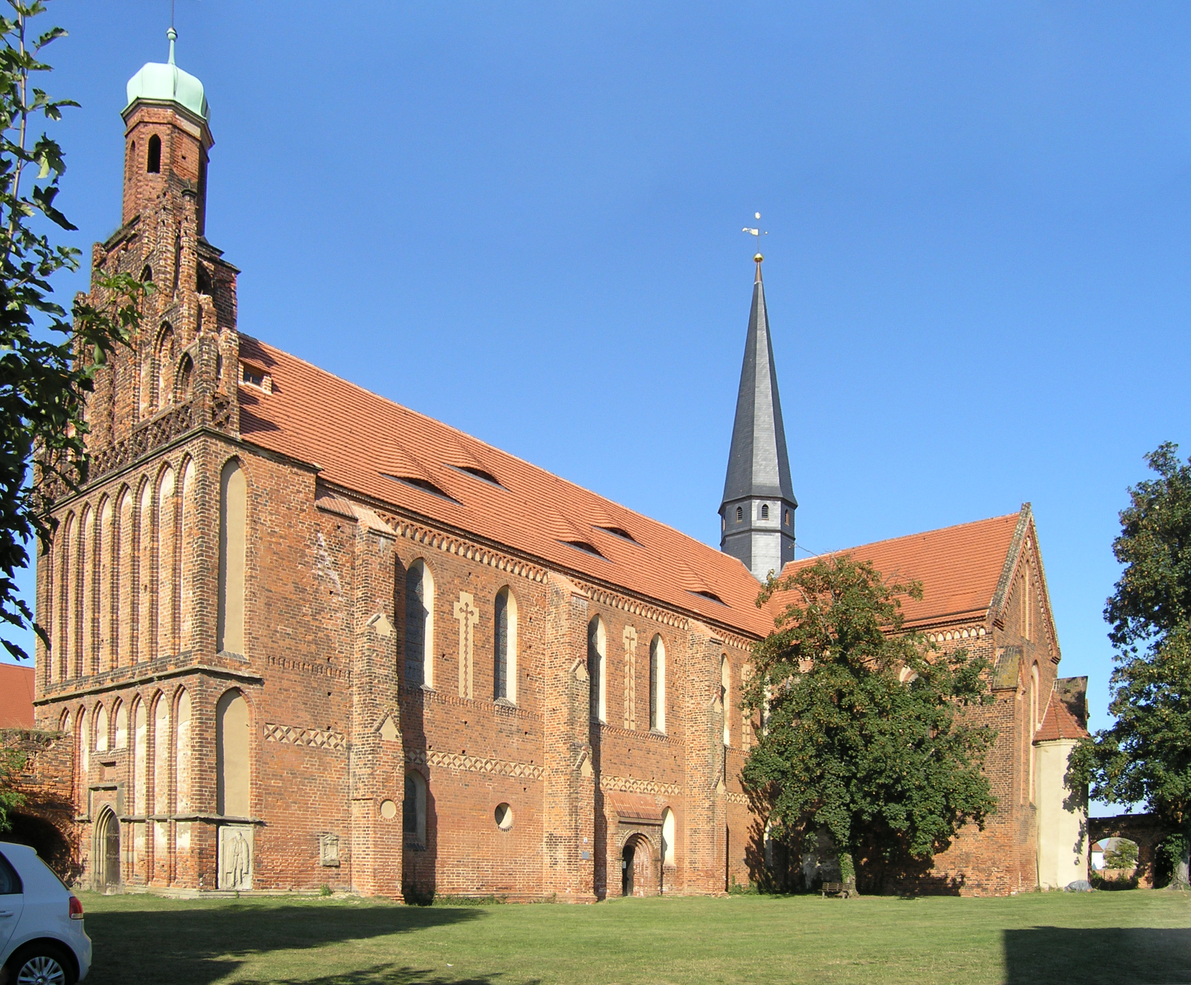 Kirche des Klosters Marienstern in Mühlberg, dem südlichsten brandenburgischen Ort an der Elbe